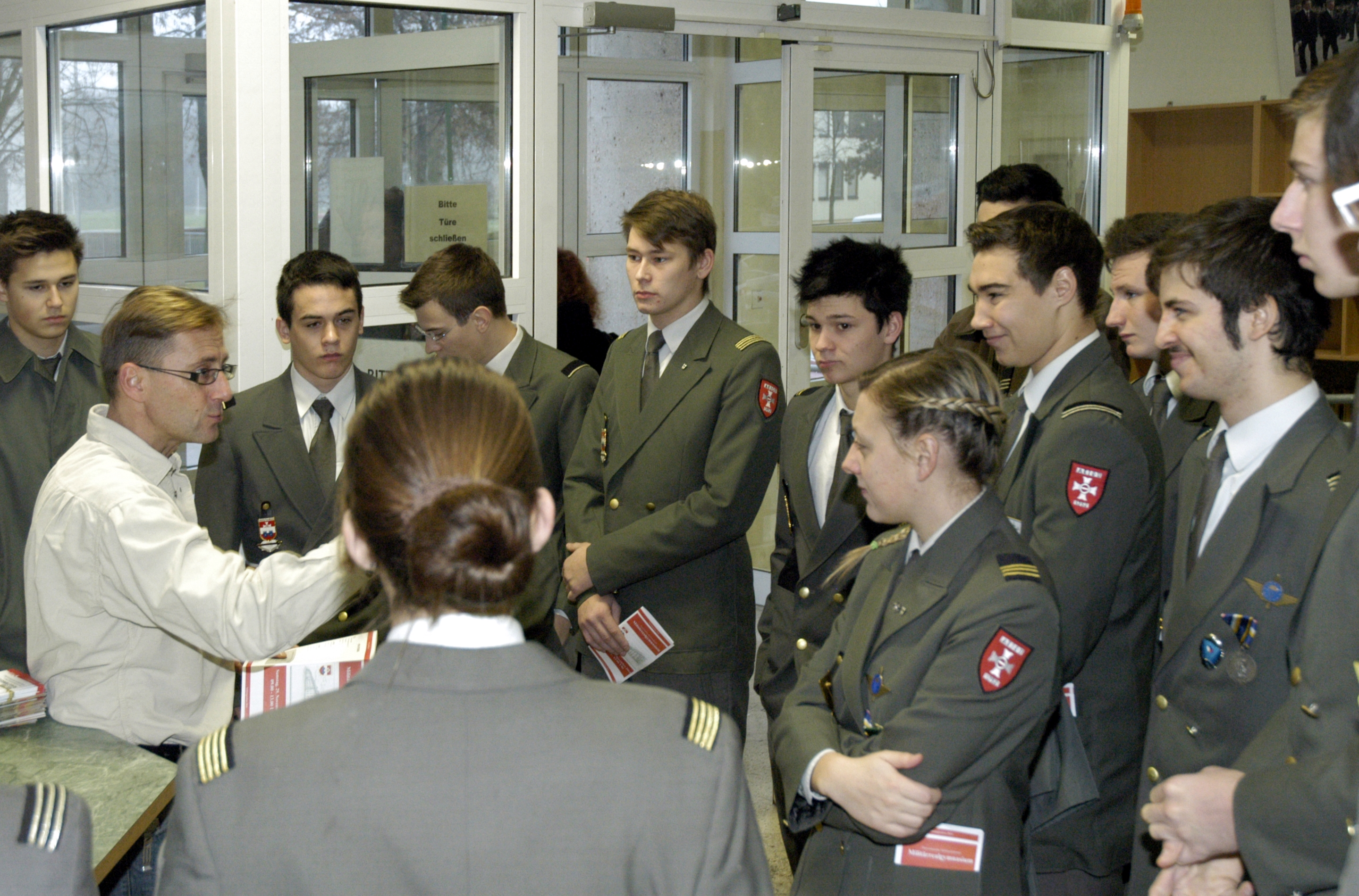 Zöglinge am Militärrealgymnasium Wiener Neustadt